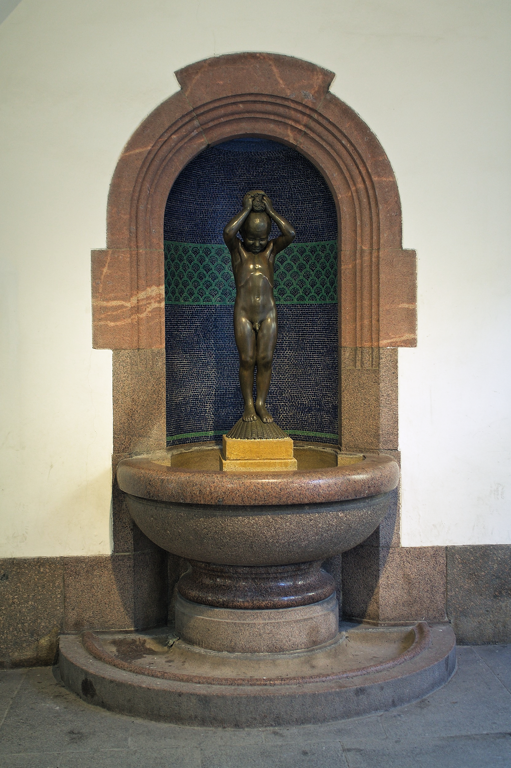 Brunnen "Badender Knabe" im Alten Rathaus Leipzig 2011.